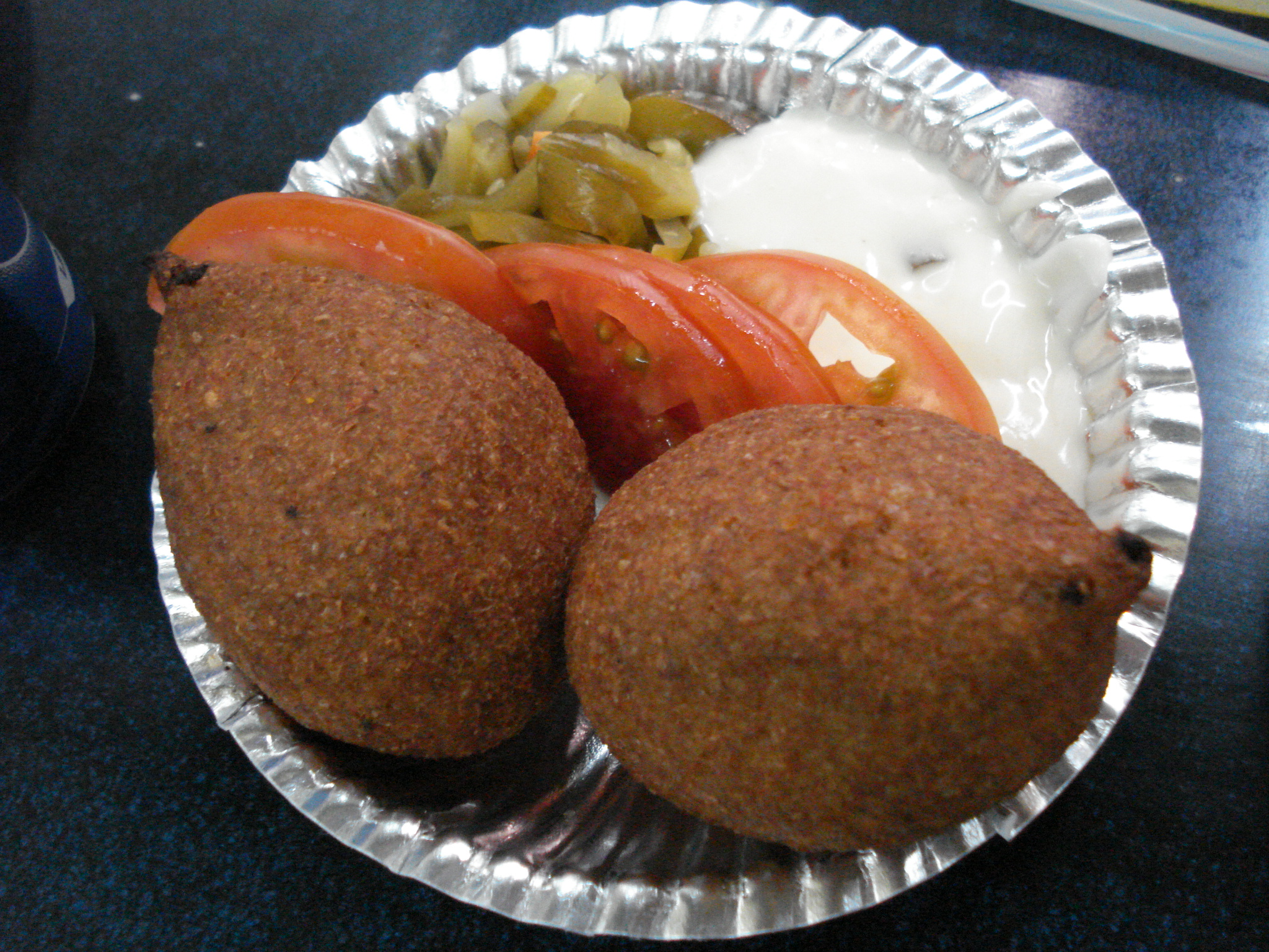 Kebbet Burgul, كبة برغل